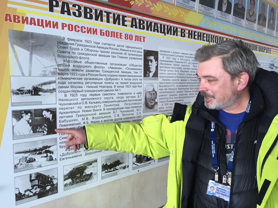 Михаил Фарих рядом с плакатом, на котором изображен его дед - Фабио Фарих. Нарьян-Мар. 2016 год. Это одна из последних фотографий Михаила, 18 апреля 2016 года он погиб в составе экипажа вертолета.